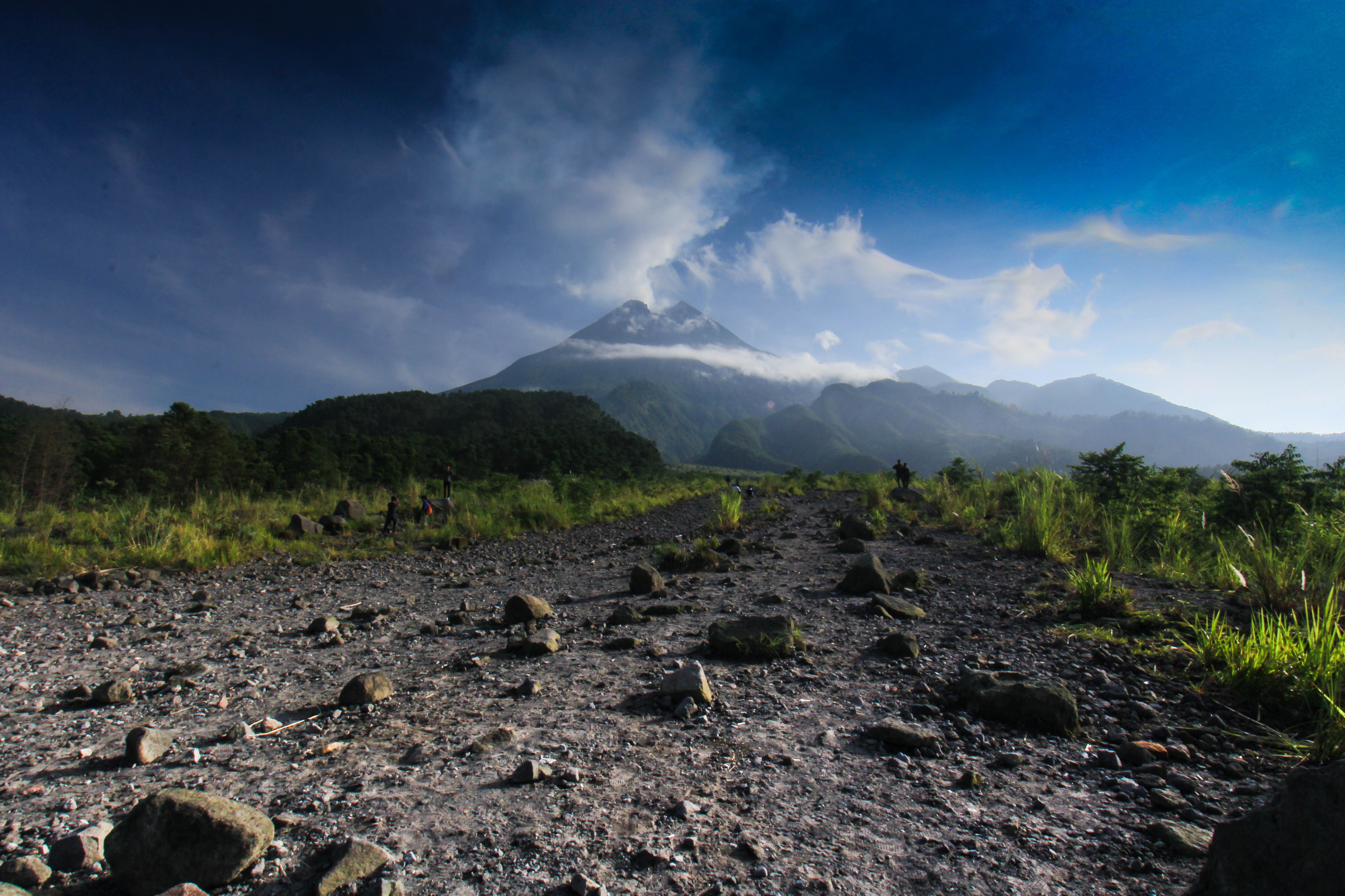 Bekas aliran lava yang ada di Kaliadem sekarang menjadi terawat dan menjadi tempat wisata serta tempat untuk mengagumi keindahan Sang Pencipta.